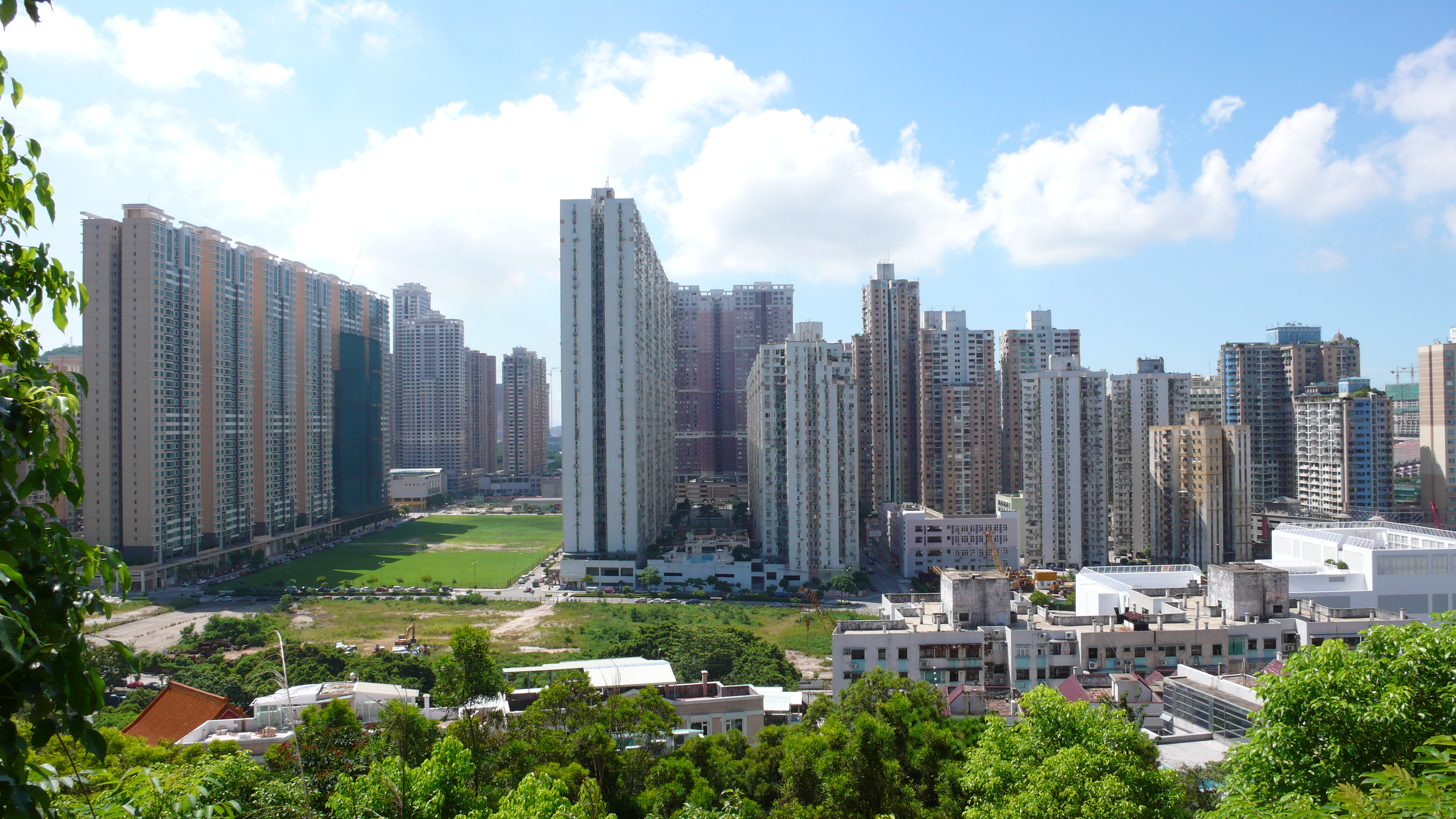 Taipa Building